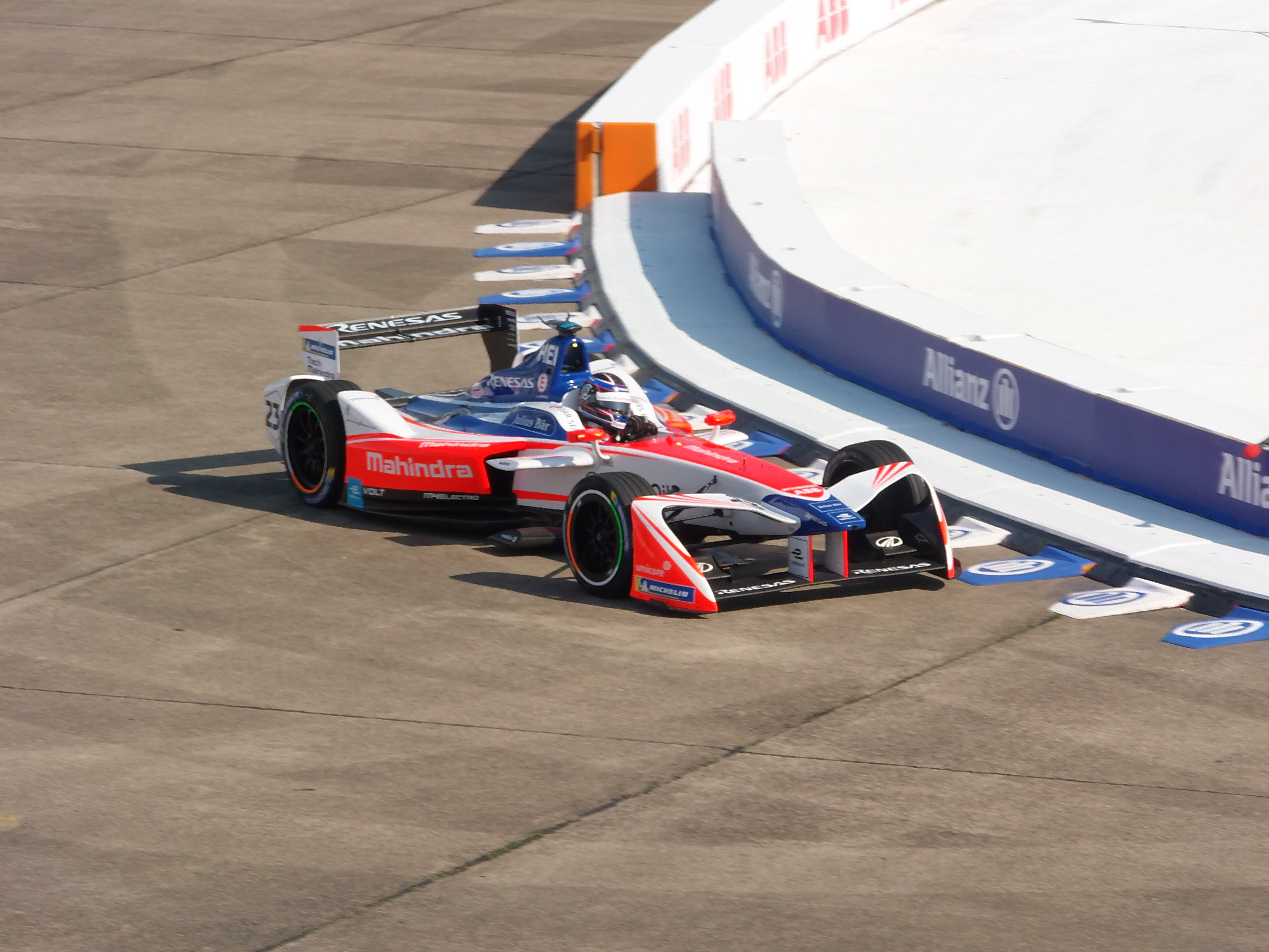 Nick Heldfeld im Mahindra M4Electro beim Berlin E-Prix 2018